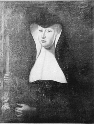 Agatha Philippina zu Guttenberg, last abbess of Eibingen Abbey